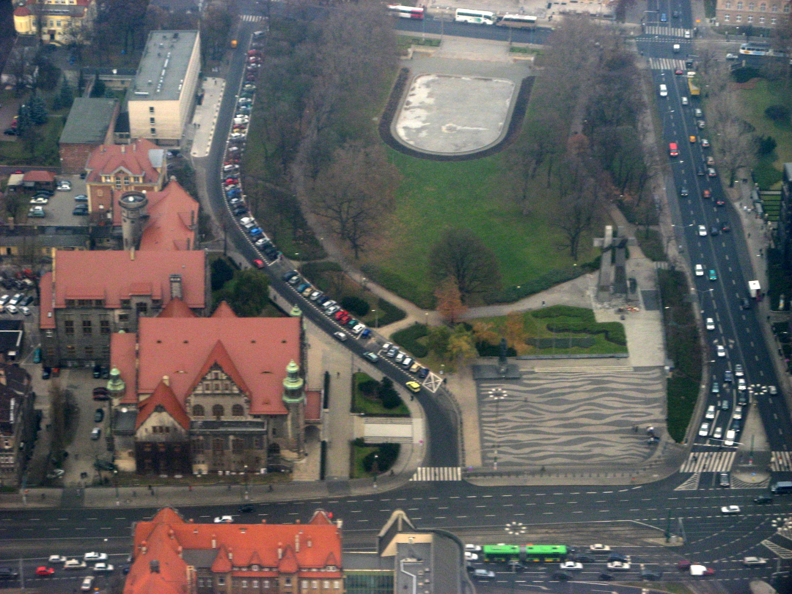 Poznan z lotu ptaka. Widok na aleje Niepodległości, ulice święty Marcin i Wieniawskiego.